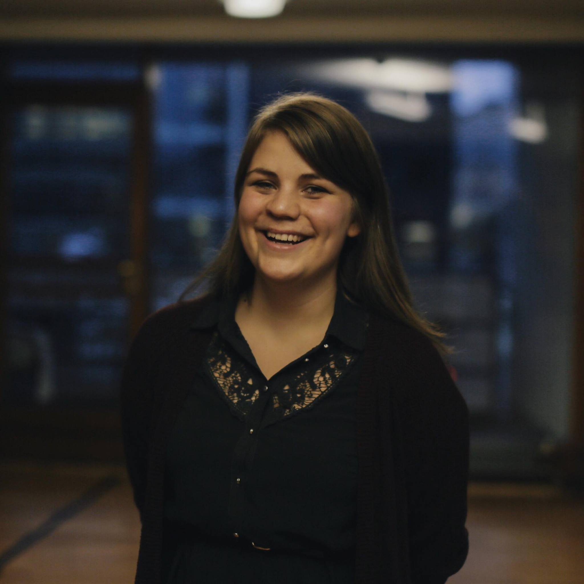 Bilde tatt av Kristoffer Klunk